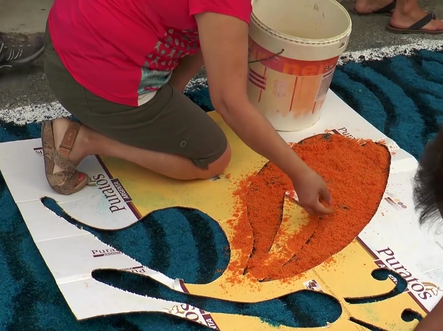 Cada 28 de agosto Aguaviva celebra su Santísimo Misterio y un kilómetro de alfombras de serrín coloreado adornan sus calles. Todos los vecinos, grandes y pequeños, salen a la calle desde bien temprano para dar forma a los diferentes modelos. Este año como temática se eligió al río Bergantes y al celebrarse en domingo fueron cientos los visitantes que acudieron a la cita.